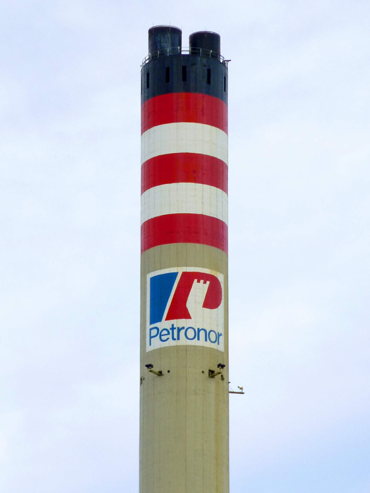 Refinería de Somorrostro (Petronor), en Muskiz, Vizcaya